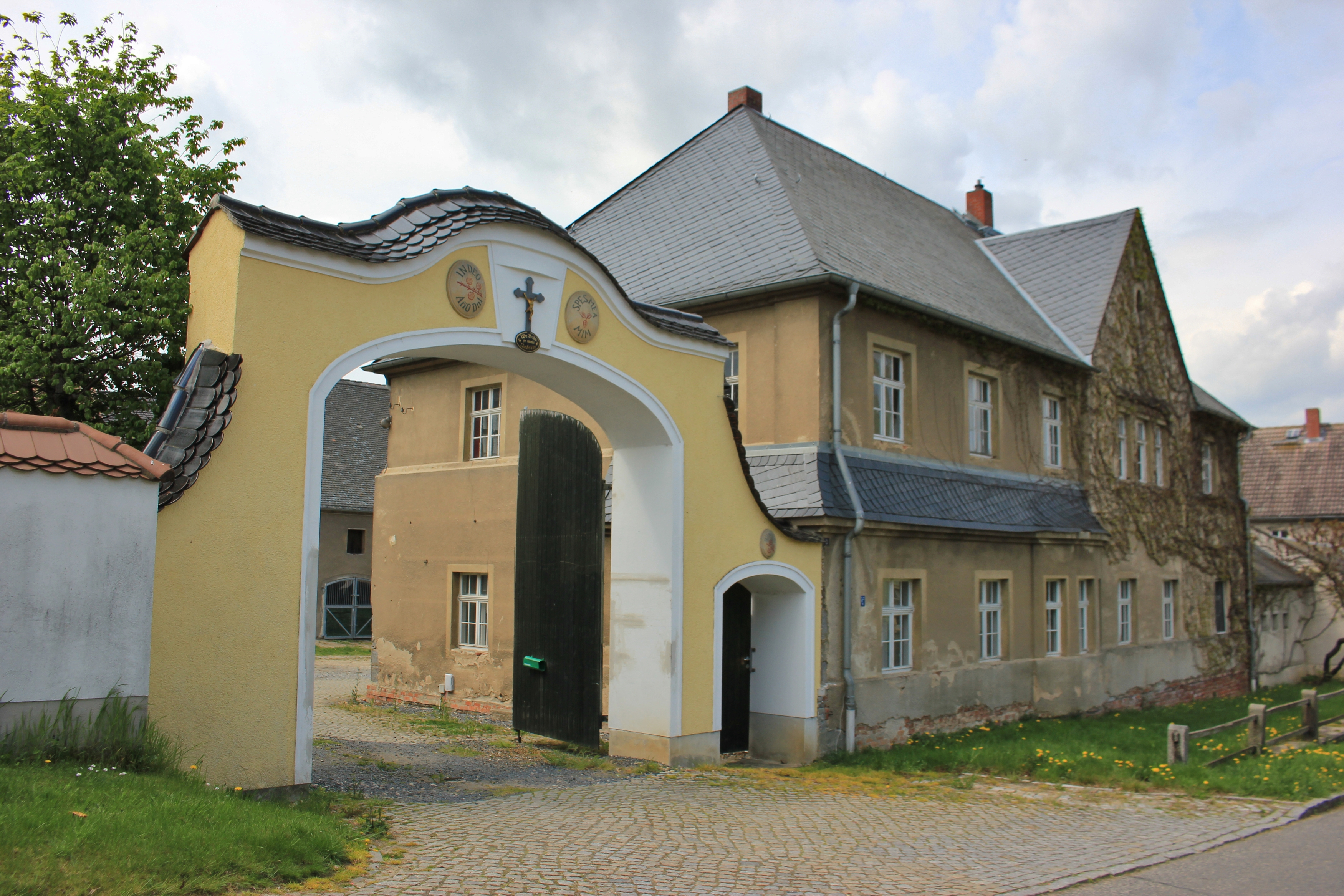 Hornjoserbsce: Wrota a domske burskeho statoka čo. 3 w Myšecach (kulturny pomnik)